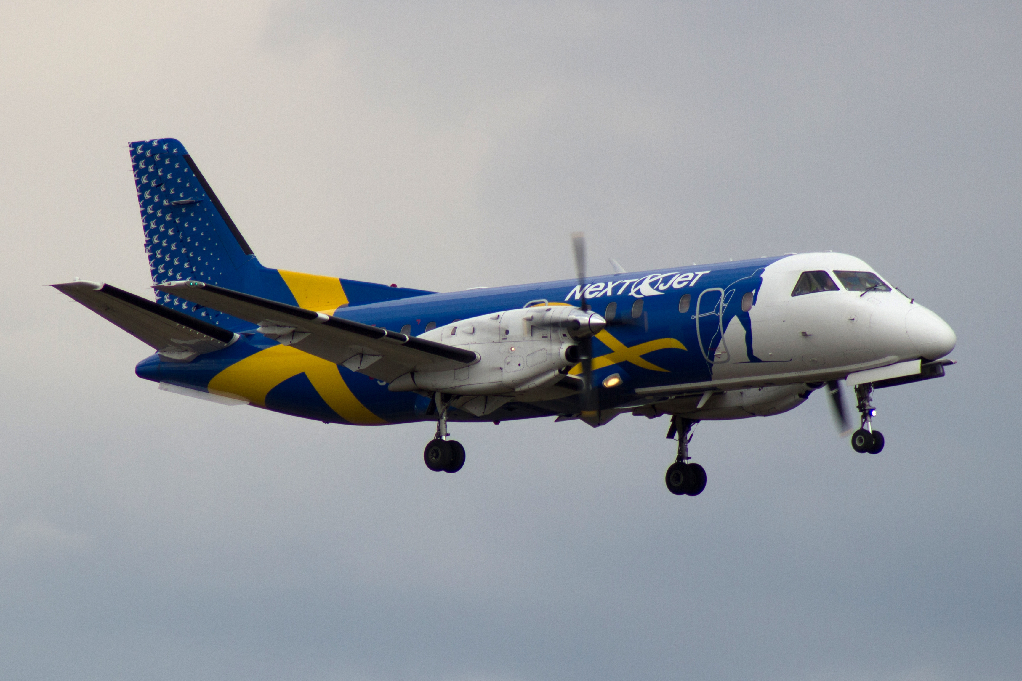 Saab 340 de Nextjet aterrando no aeroporto de Arlanda.